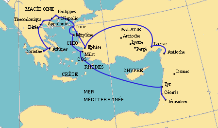 Voyage de Paul (troisième). Image créée avec Gimp à partir d'un fond de carte fourni par l'espace cartographie du site sciences-po. Domaine Public.